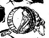 この構図はのちに『富嶽三十六景』「尾州不二見原」に転用される